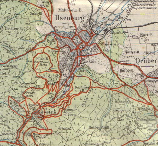 Karte von Ilsenburg im Maßstab 1:50.000, 1912. Verlag: Albert Goldschmidt, Berlin, 1912